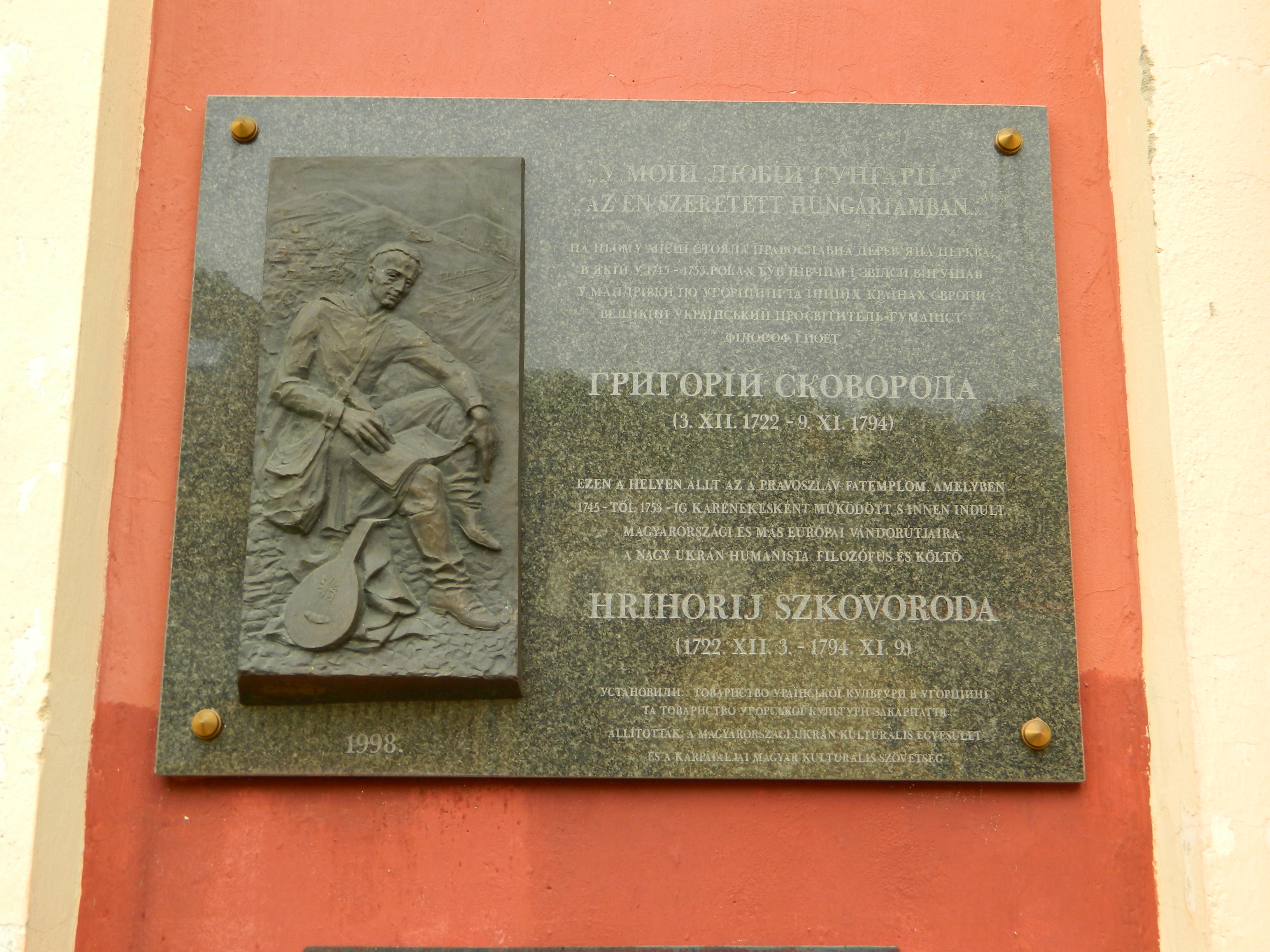 Памятная доска на стене храма святителя Николая чудотворца в городе Токай